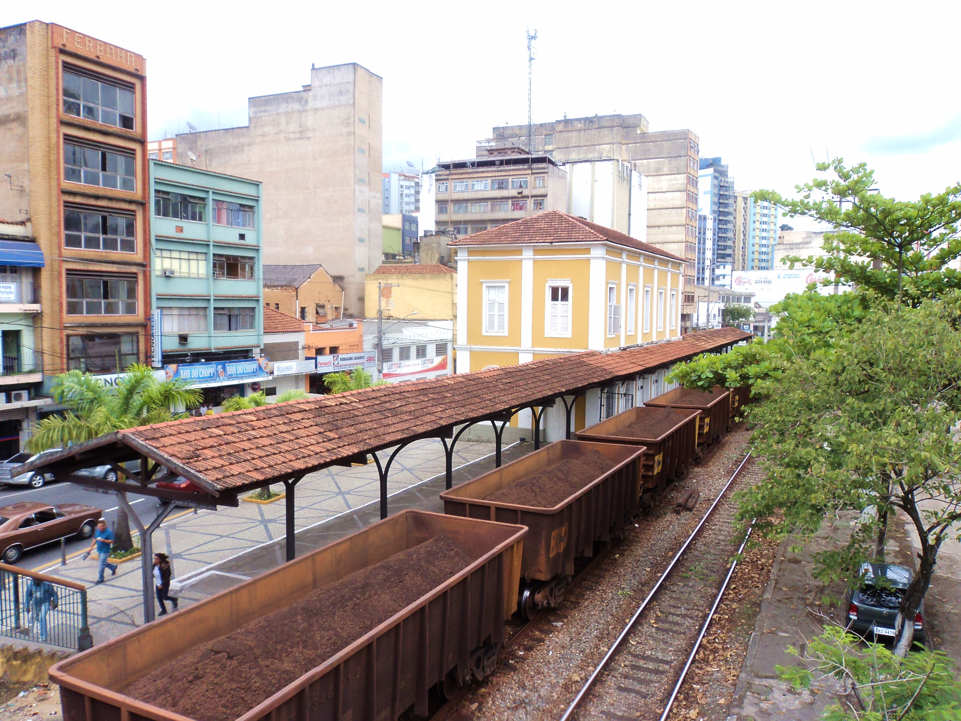 Antiga estação ferroviária de Barra Mansa, estado do Rio de Janeiro, Brasil.